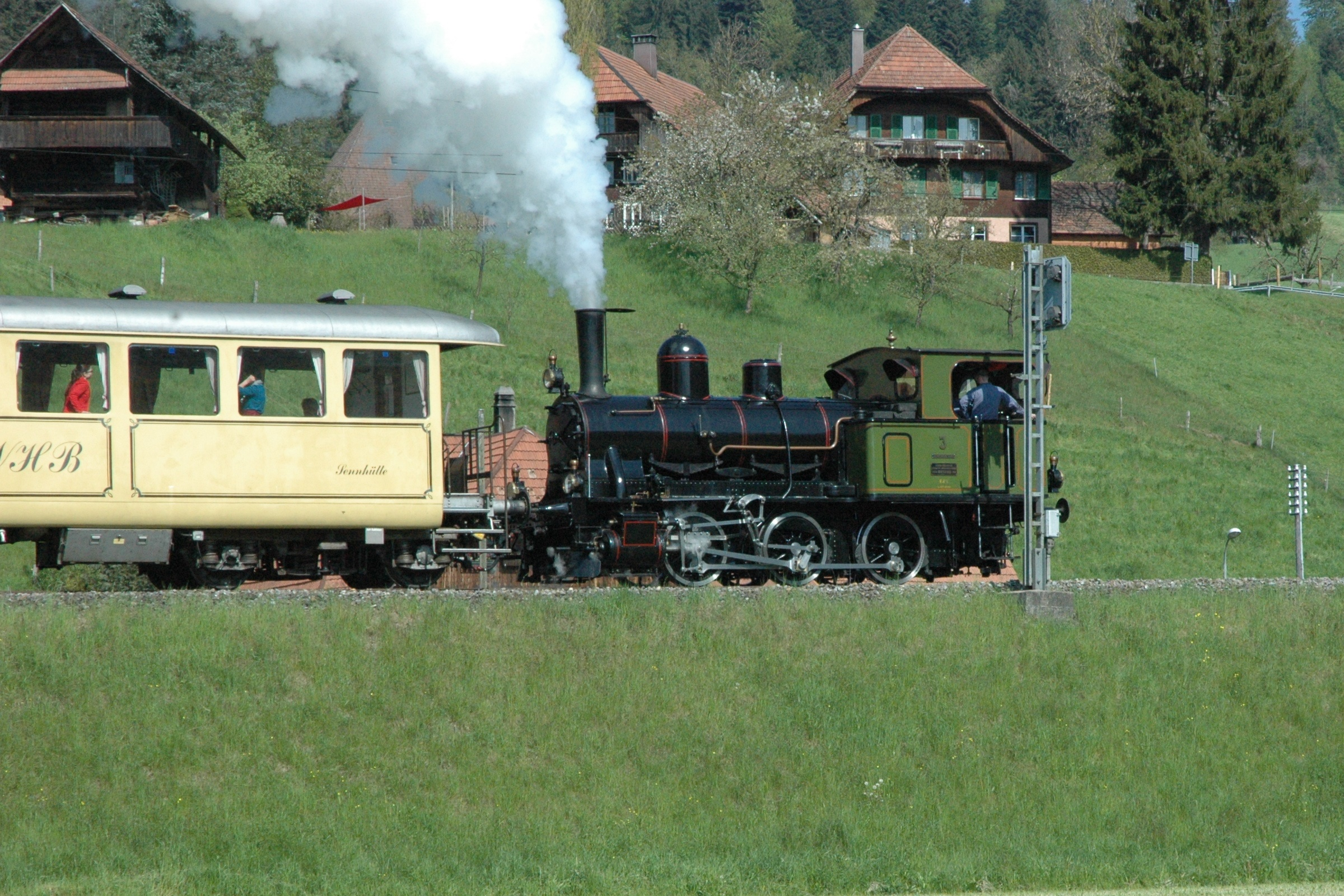 Dampflokomotive Ed 3/3 Nr. 3 (ex GTB) des Vereins Dampfbahn Bern (VDBB) mit Personenzug bei der Einfahrt in die Haltestelle Gammenthal auf der Strecke der Emmentalbahn GmbH